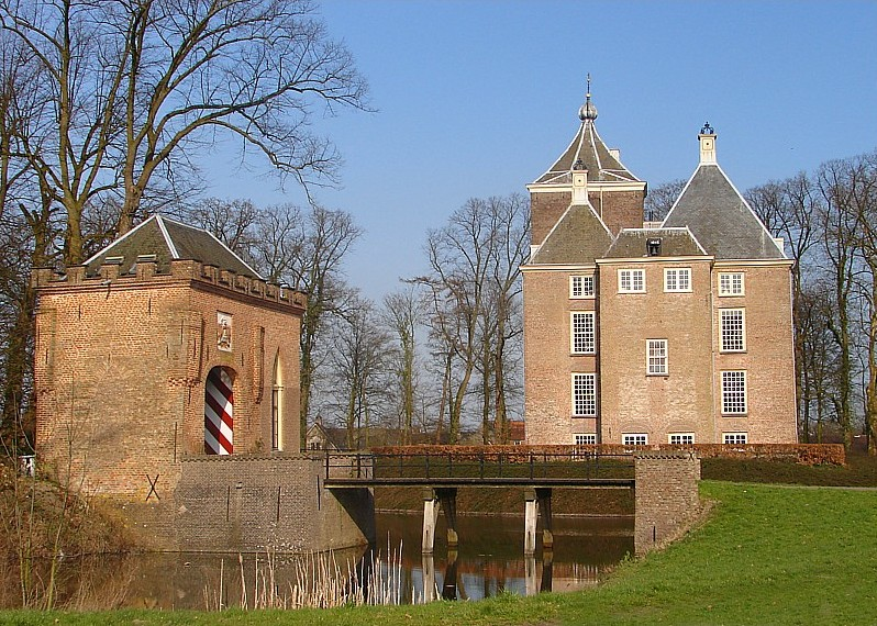 Kasteel Soelen te Zoelen